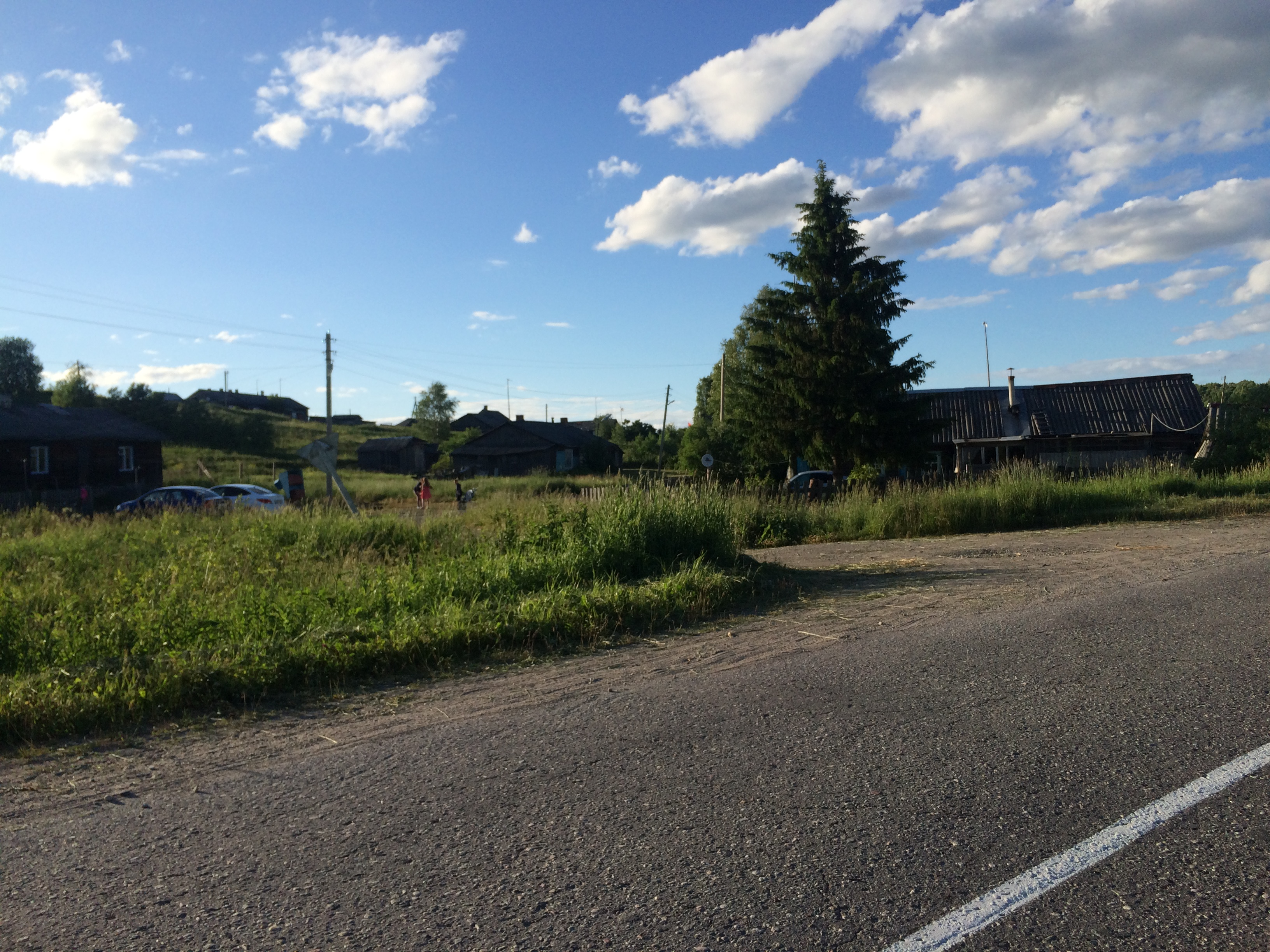 Палтега